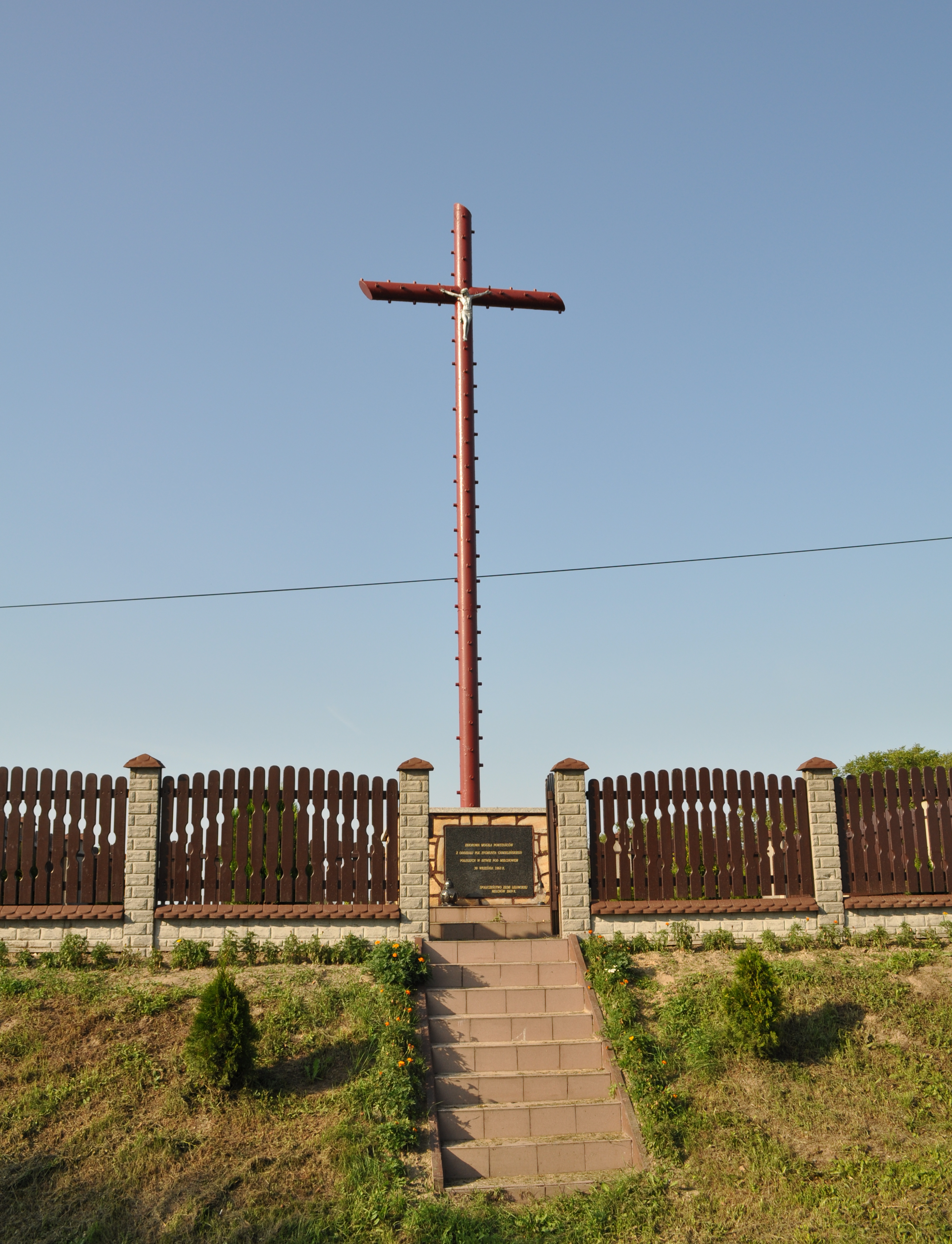 Ten obiekt znajduje się w Ewidencji Miejsc Pamięci Województwa Śląskiego dla miejscowości Lelów pod numerem 109/12.Opis